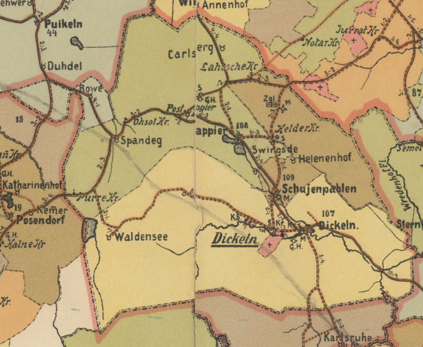 Dikļi kihelkonna mõisad 1903. aasta kaardil.